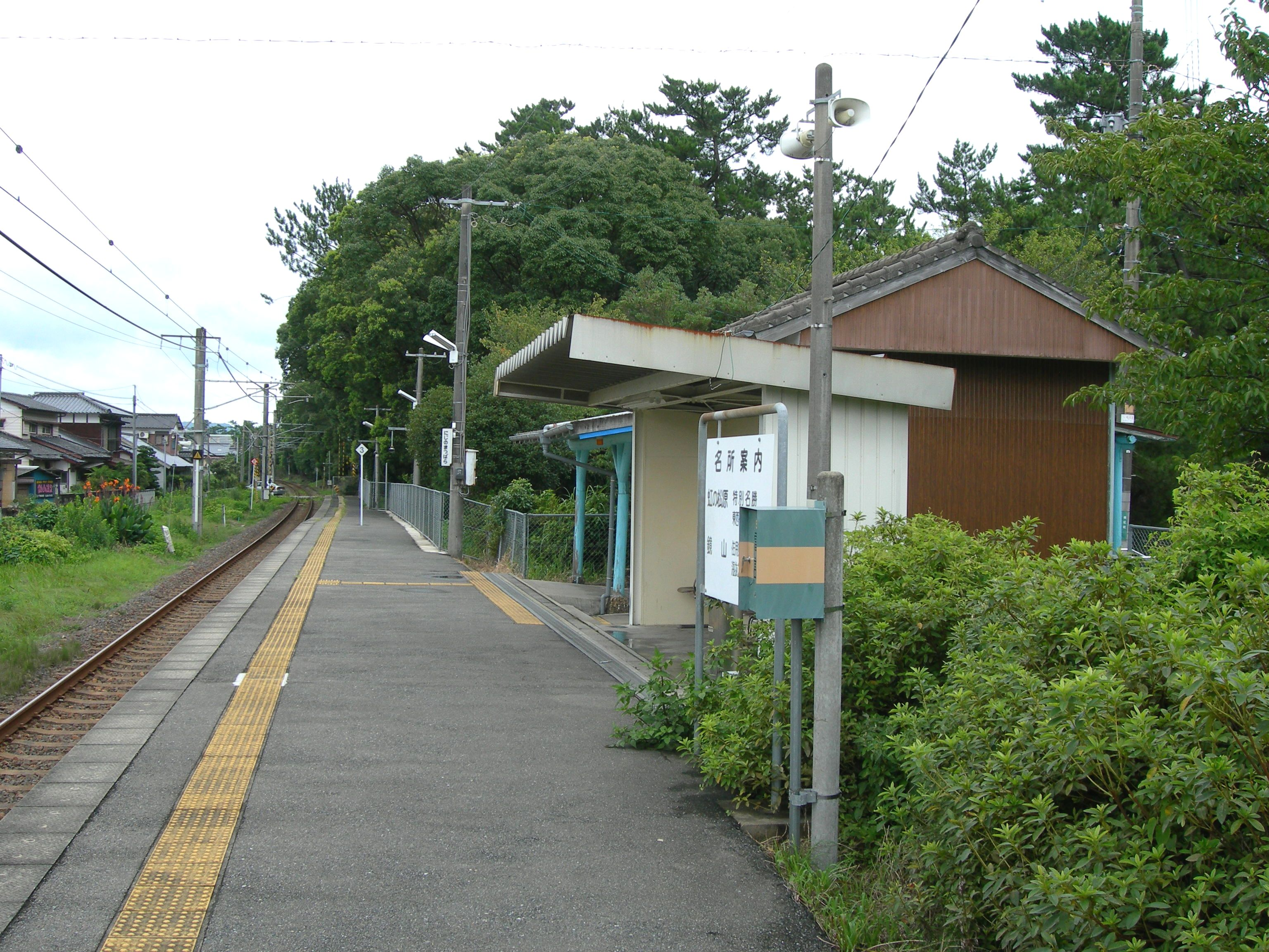 JR九州 虹ノ松原駅ホーム